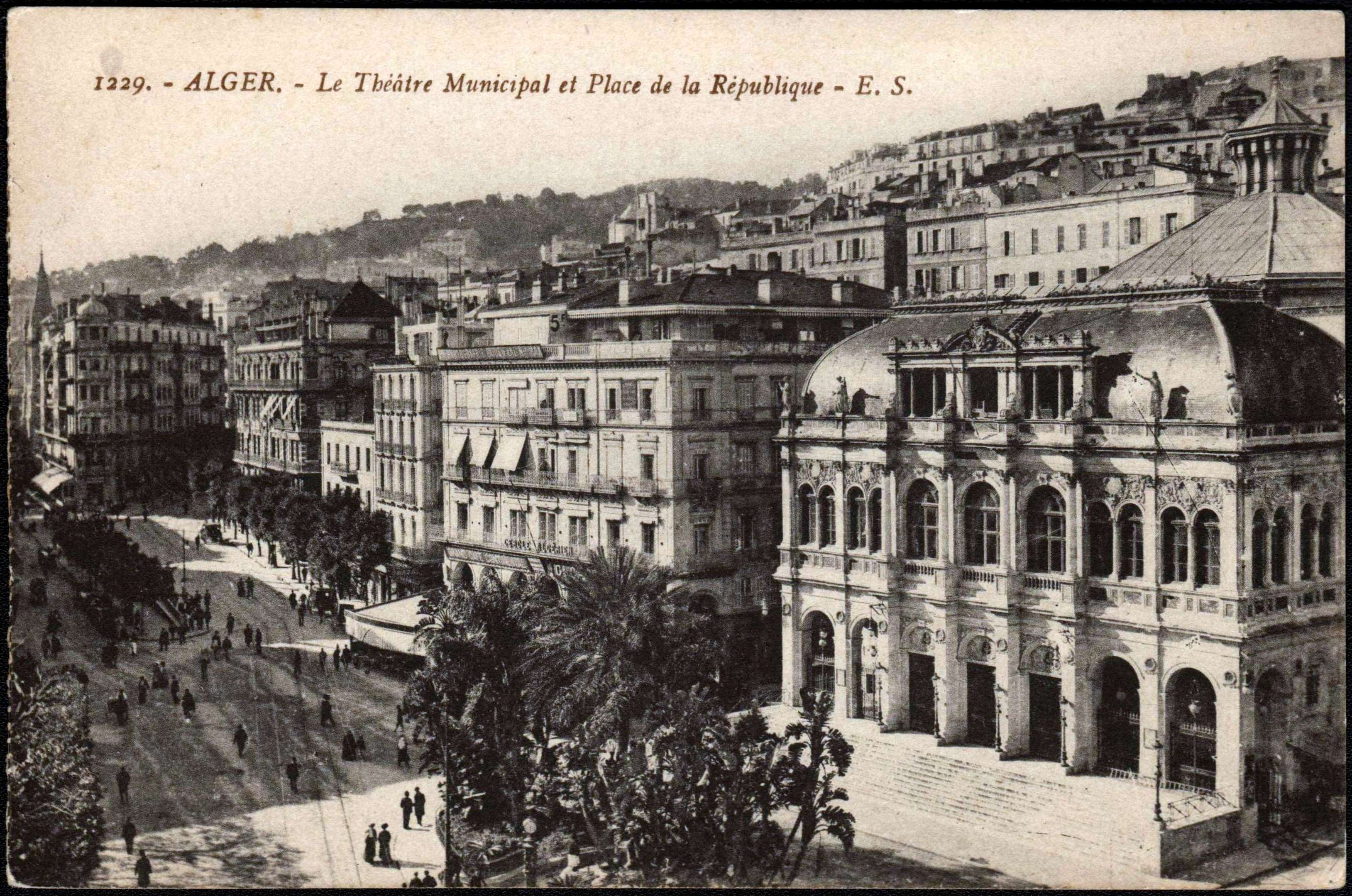 1229. -ALGER. - Le Théâtre Municipal et Place de la République